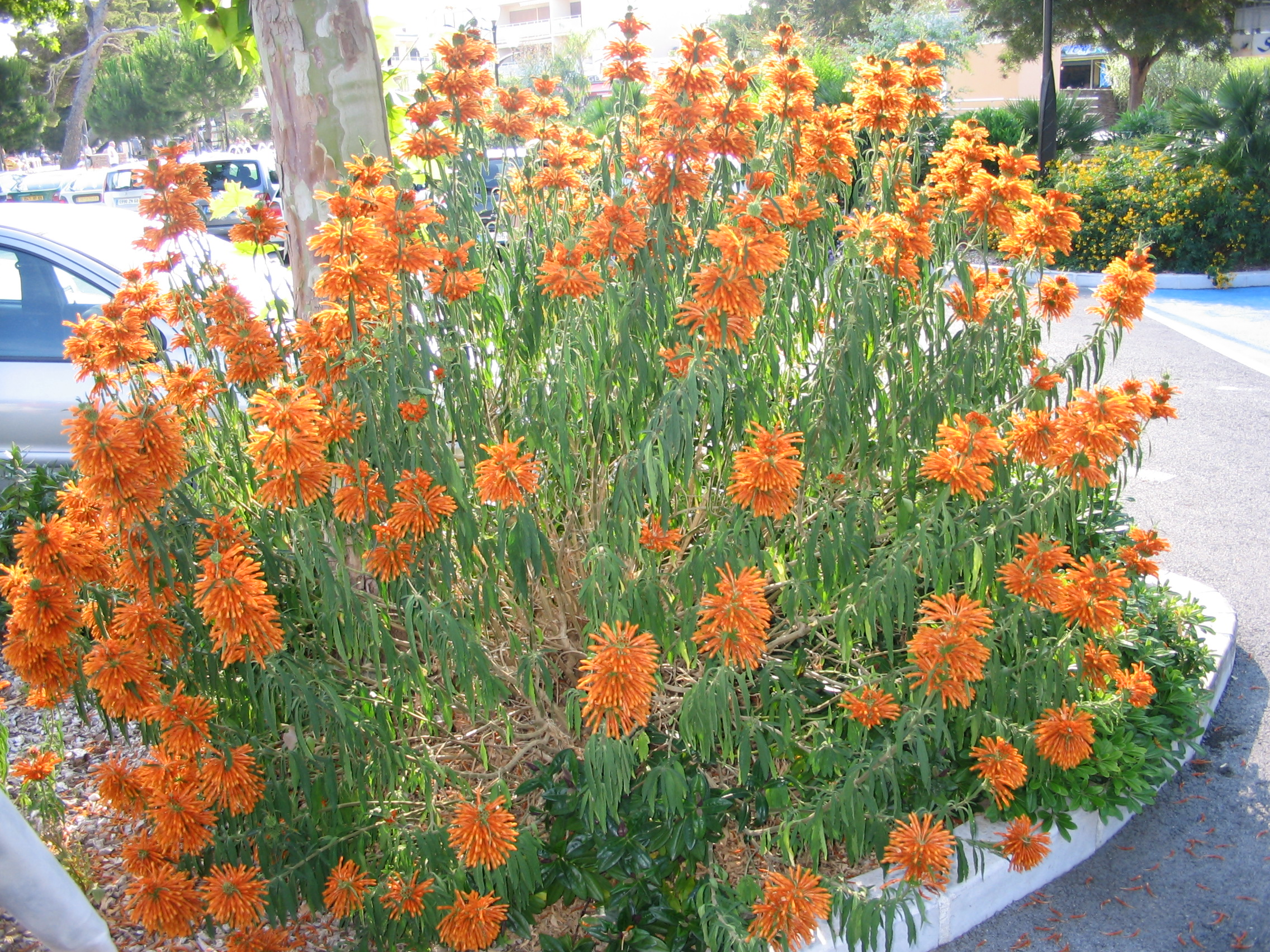 Queue de lion, Leonotis leonurus (famille des Lamiaceae), port de Bormes-les-Mimosas - La Favière